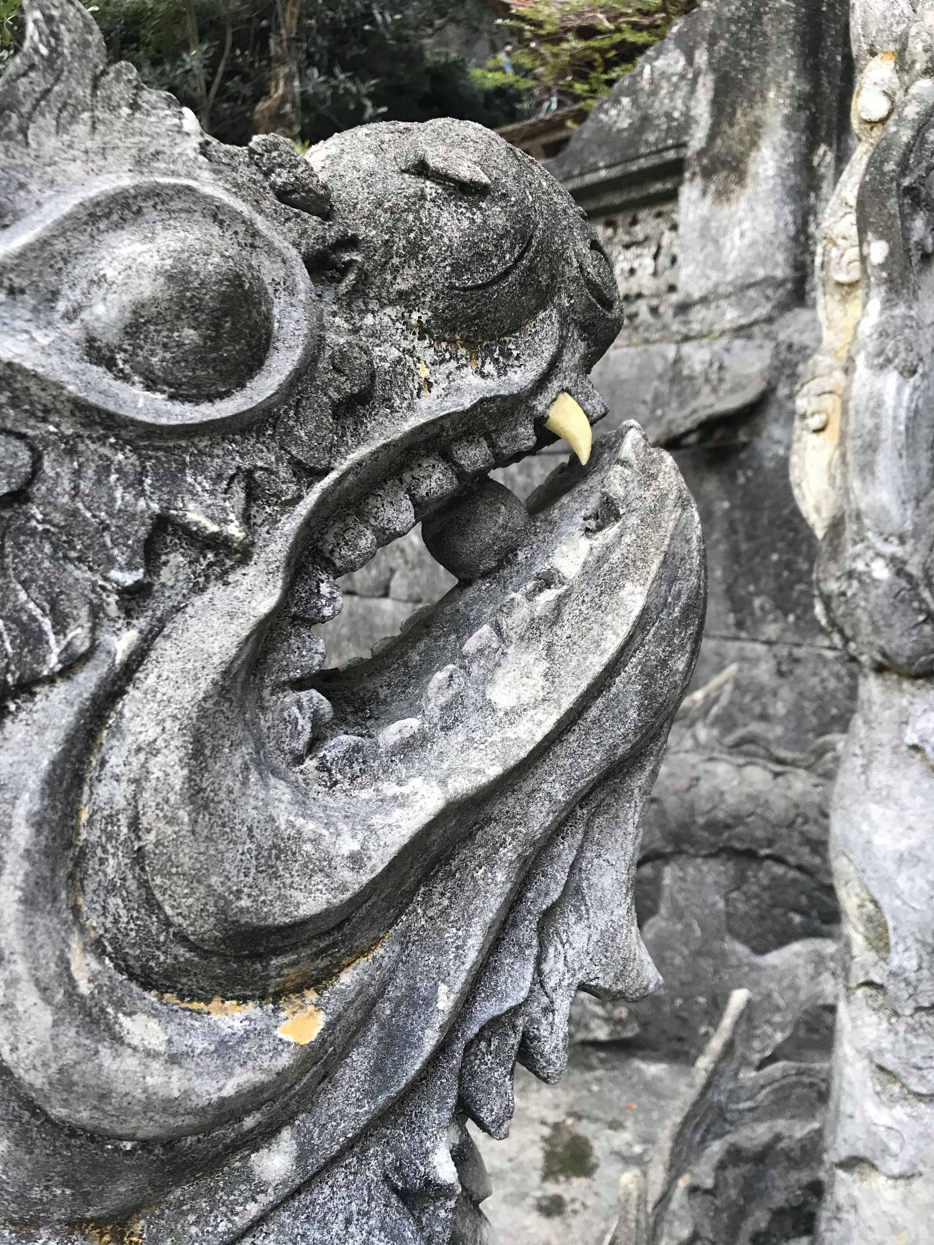 Con rồng trước chùa Hạ có hai chiếc răng làm từ ngà nổi bật lên.